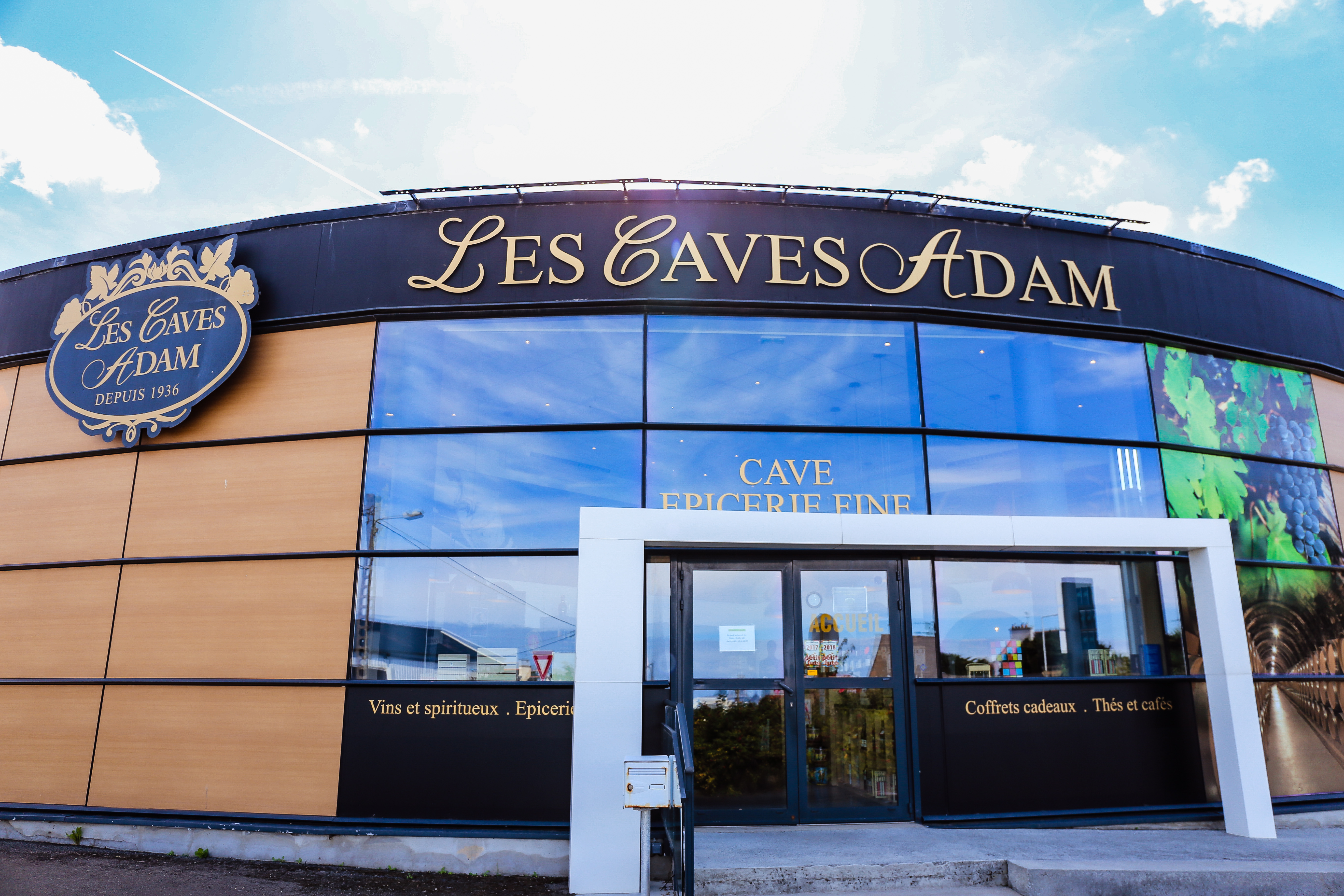 Boutique de produits d'épicerie fine Les Caves Adam située à Ploudalmézeau (Finistère). Les établissements ADAM possèdent notamment la Brasserie des Abers située à côté de la boutique de Ploudalmézeau.